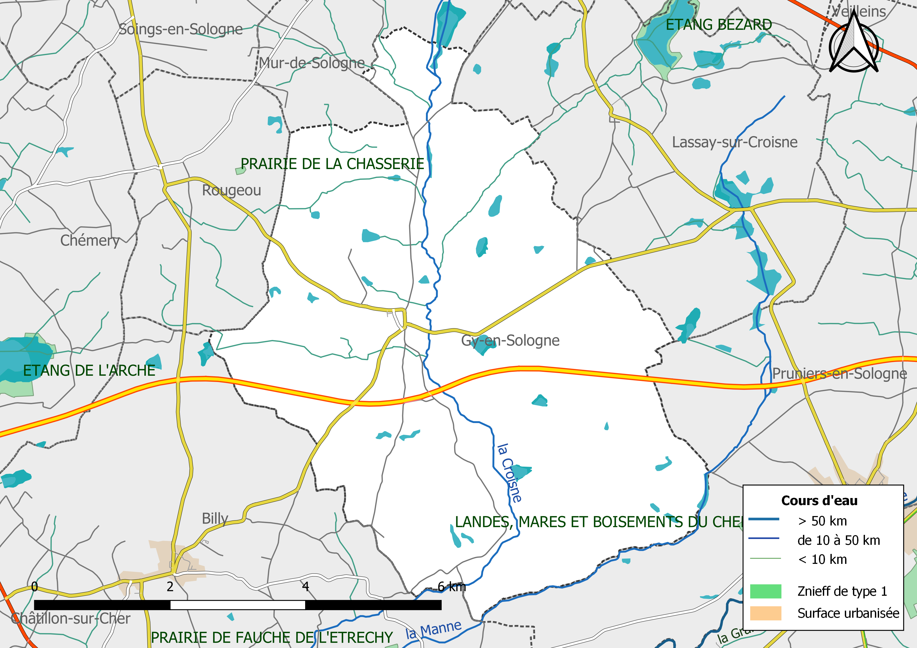 Zones naturelles d'intérêt écologique faunistique et Floristique (ZNIEFF) de type 1 de la commune de Gy-en-Sologne. (Loir-et-Cher, France).